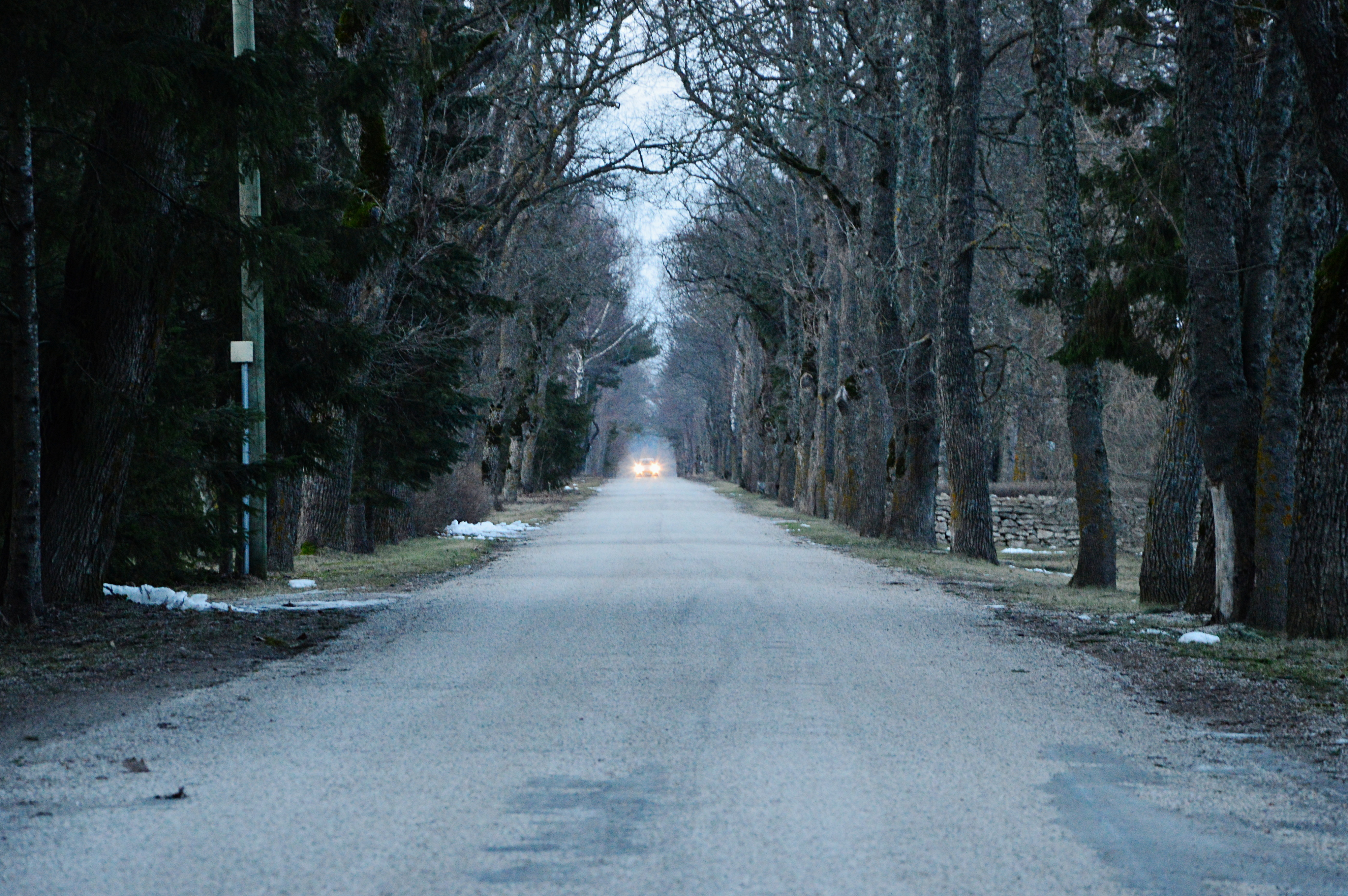 Virtsu mõisapargi allee.